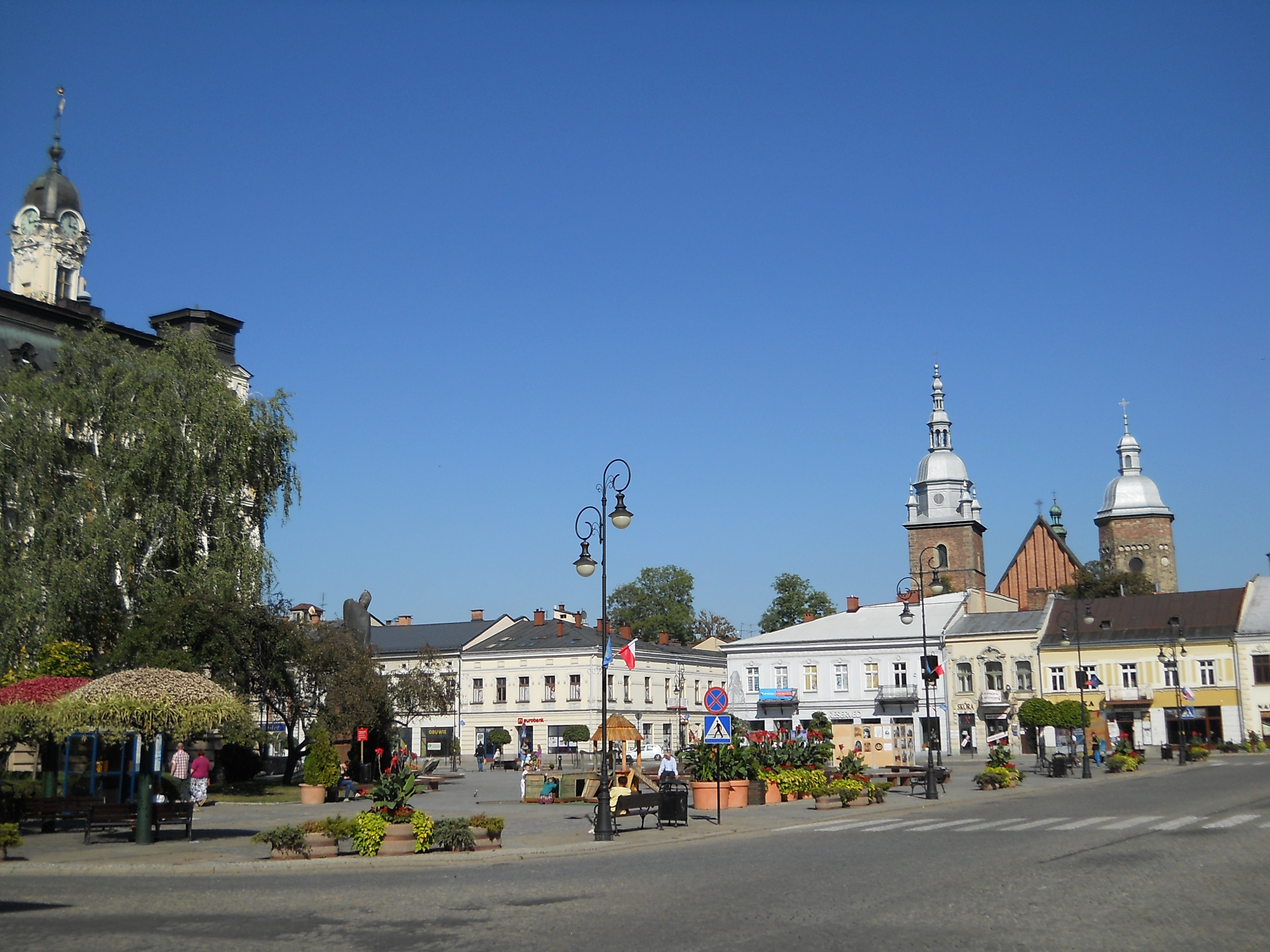 Nowy Sącz, kościół par. p.w. św. Małgorzaty, XIV, XIX